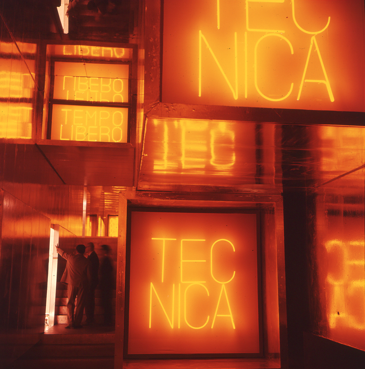 Servizio fotografico : Milano, 1964 / Paolo Monti. - Buste: 5, Fototipi: 5 : Diapositiva, sviluppo cromogeno/ pellicola ; 6x6. - ((Serie costituita da 5 diapositive identificate con i nn.: 1948-1952. Sulla busta RC1948 manoscritto: "Triennale/ 1964". La suddetta serie è contenuta nella scatola identificata con la numerazione RC1827-1962. Sulla scatola manoscritto a pennarello nero: "Arte e Architettura".